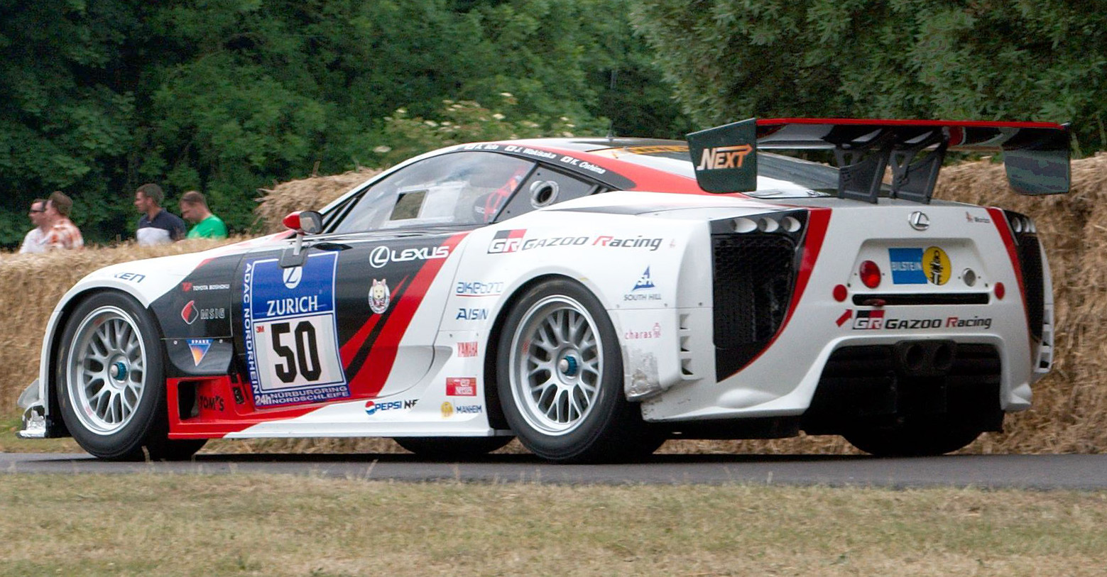 Lexus LF-A